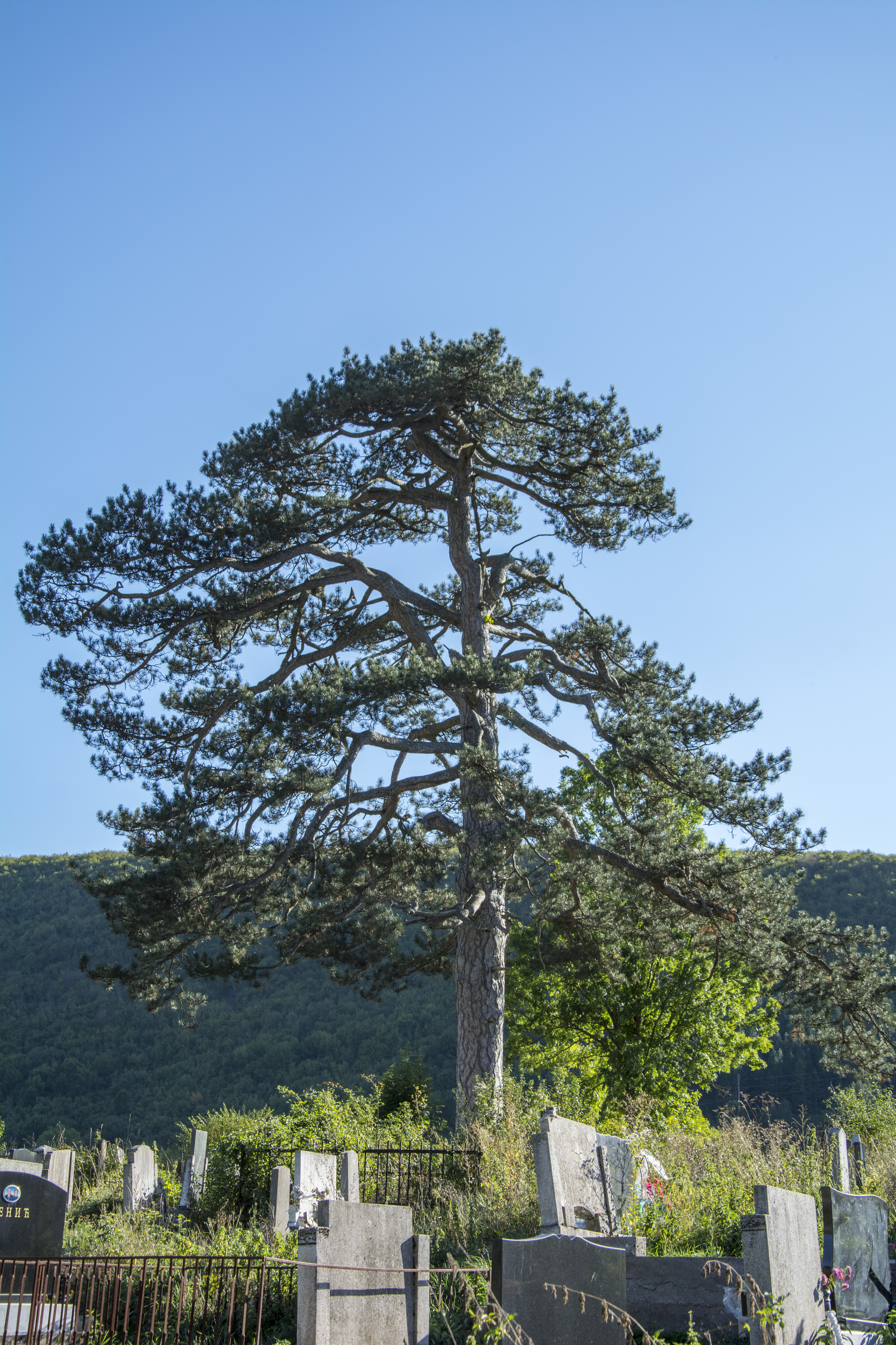 Природна реткост - Црни бор